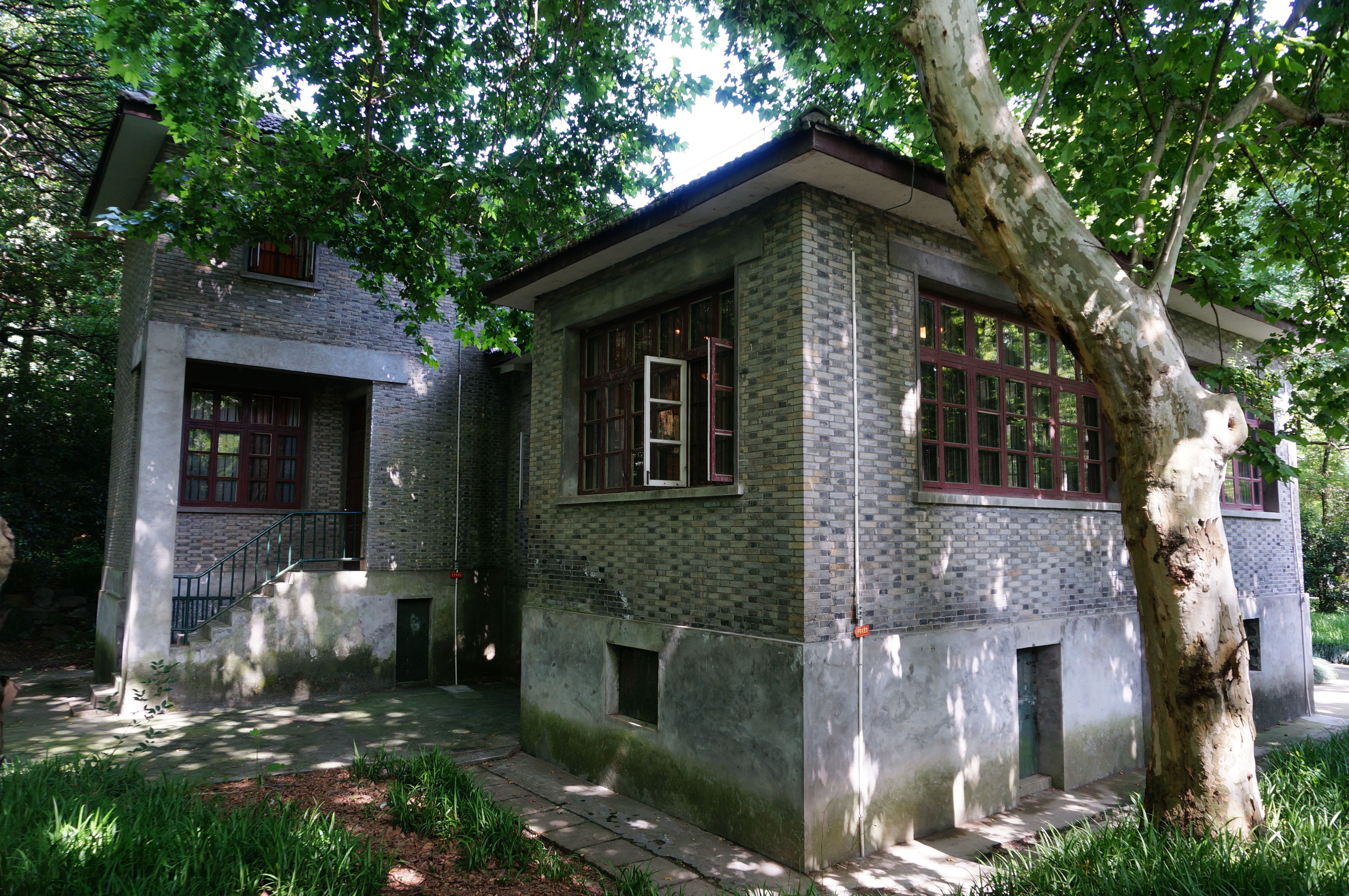 杭州林风眠故居，西北侧。